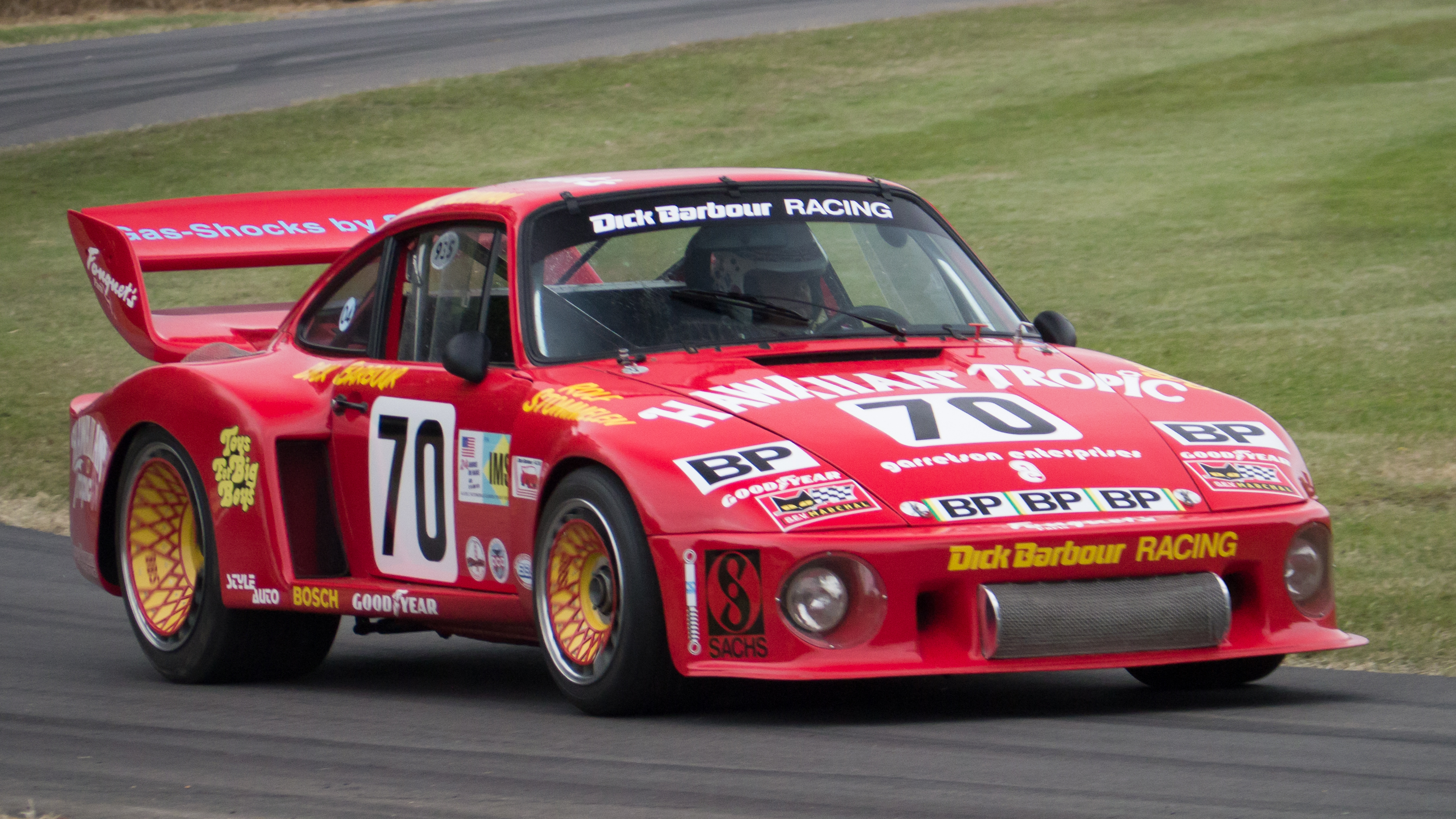 1979 Porsche 935